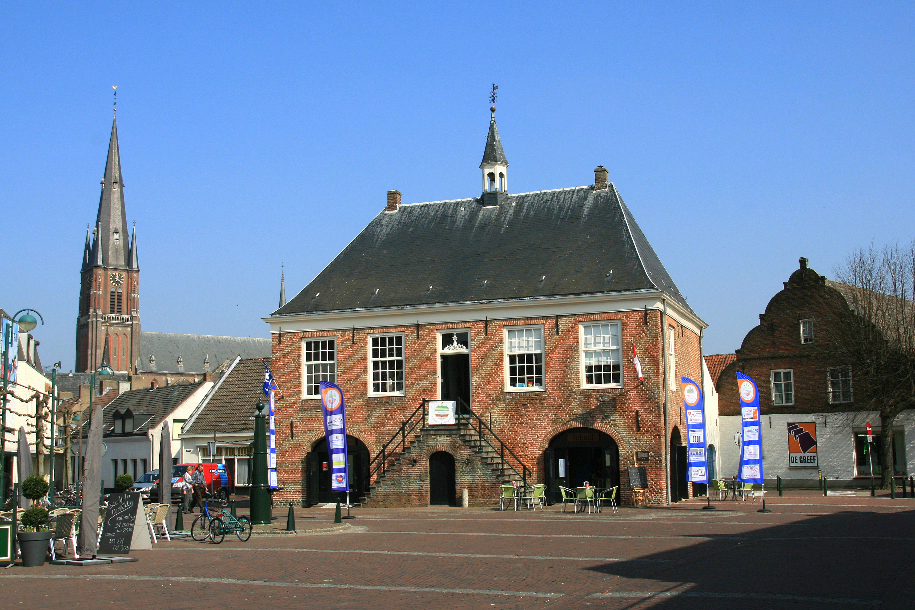 Het schepenhuis is een eenvoudig gebouw op rechthoekige plattegrond met schilddak en bordes met trappen. Het werd in 1771 gebouwd naar plannen van de Boxtelse landmeter Hendrik Verhees en heeft dienst gedaan als raadhuis met cachot en brandspuitbergplaats, maar ook als garen- en botermarkt. Bij de restauratie in 1981-'82 werd het gebouw, dat door verbouwingen ingrijpend was gewijzigd, in de oorspronkelijke staat gereconstrueerd.